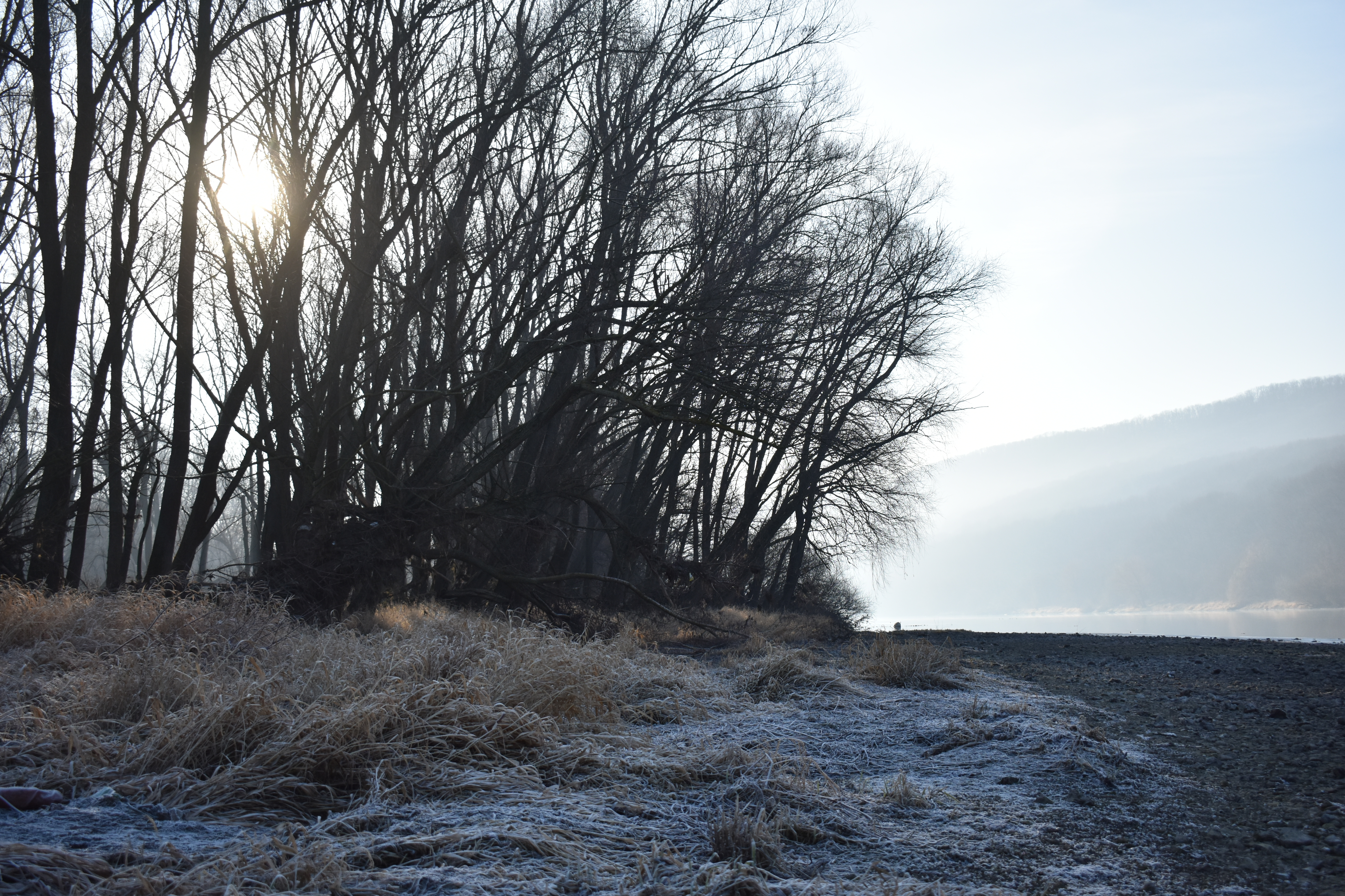 Регіональний ландшафтний парк "Дністер" в районі с. Садківці Могилів-Подільського району Вінницької області